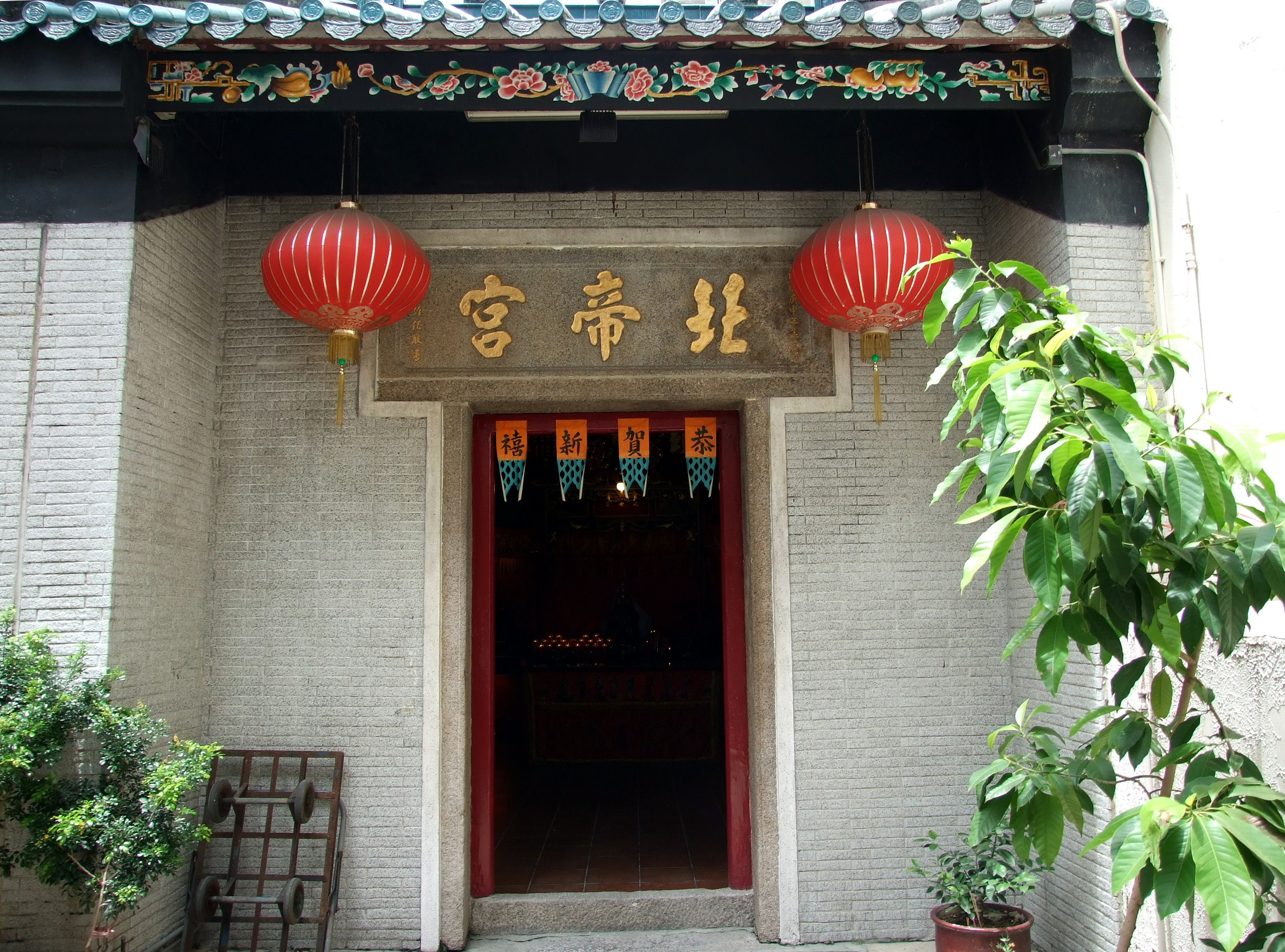 中文（香港）: 深水埗北帝廟